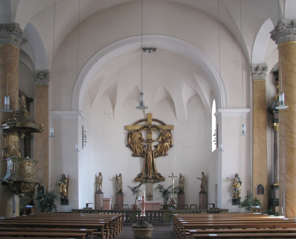 St.-Sebastian-Kirche in Mannheim.